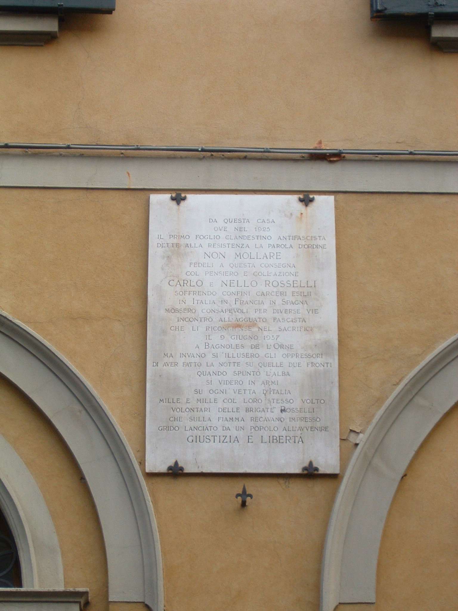 immagine tratta da: ResistenzaToscana.it autore: Giovanni Baldini